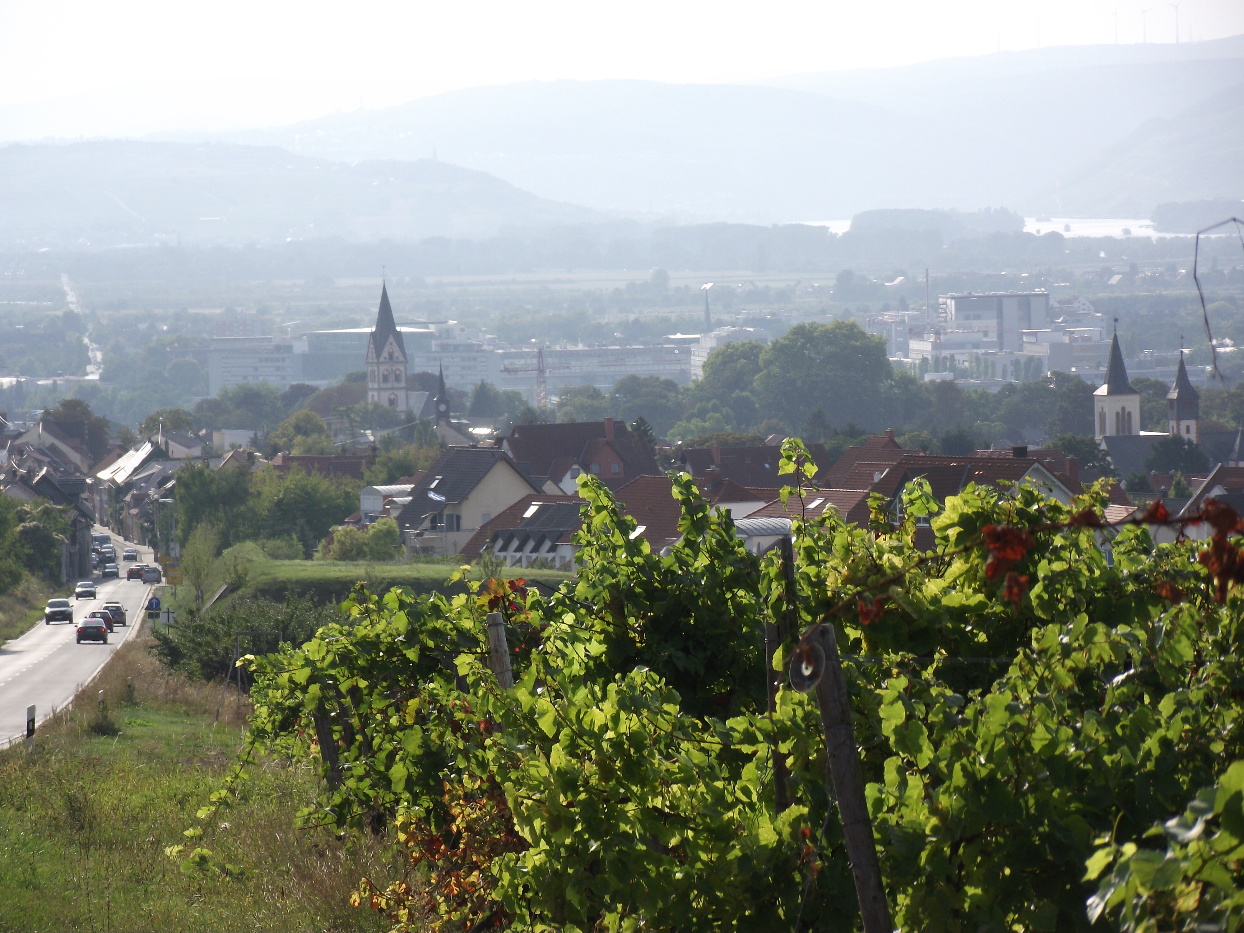 Nieder-Ingelheim im September 2012